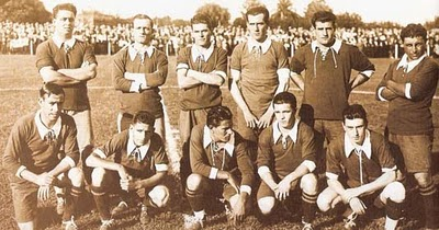 El plantel del Club Atlético Independiente campeón de la "Copa Competencia" de 1924. Arriba: Ferro, Debuglio, José Pérez, Isusi (arquero), Ucar y Scoffano. Abajo: Canaveri, Lalín, Manuel López, Ravaschino y Orsi.